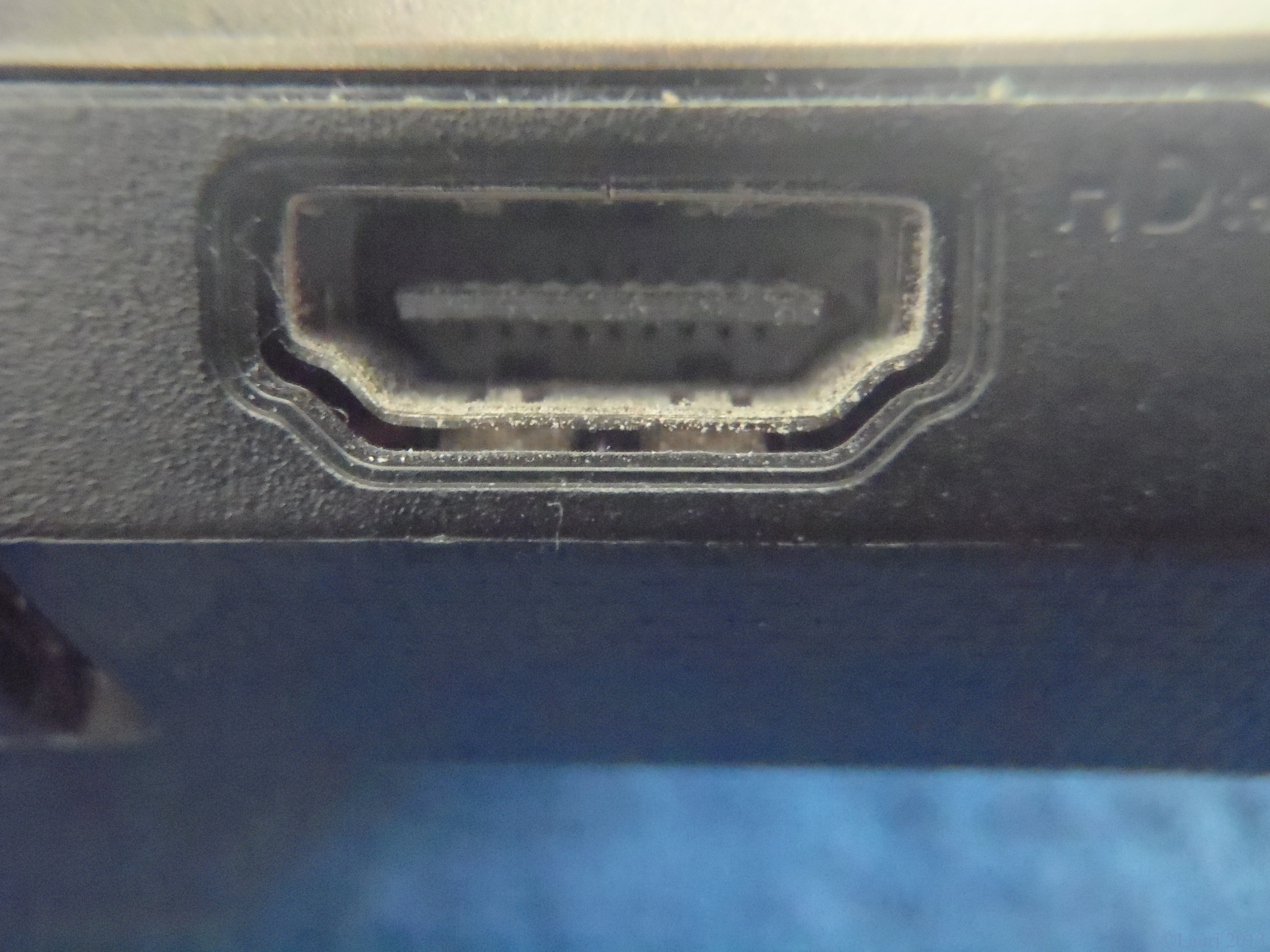 Normaali HDMI-liitin